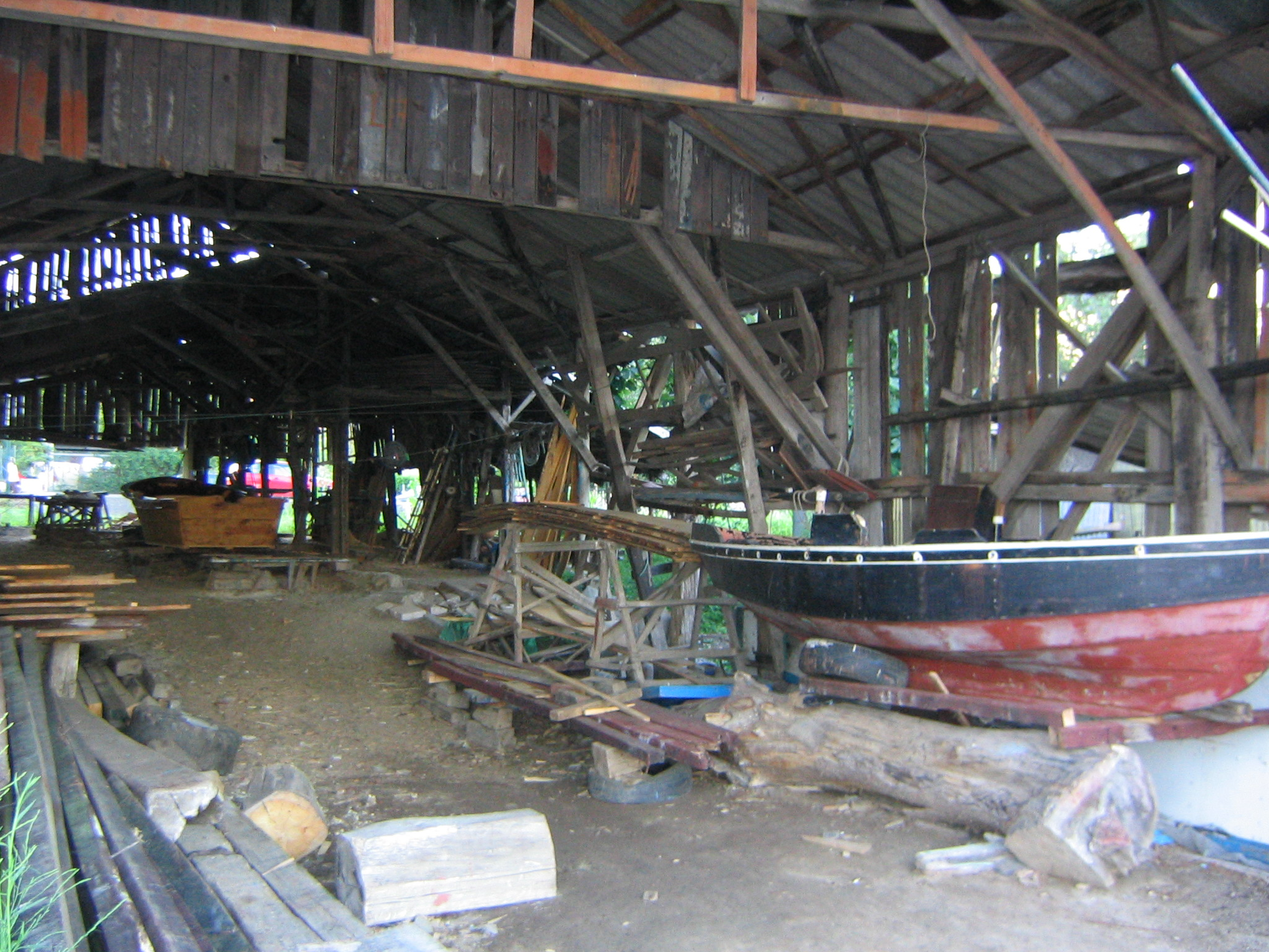 Astillero de ribera en Domaio en Moaña, Pontevedra, Galicia (España).